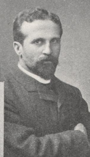 Andreas Grieser, bayerischer Politiker und Jurist